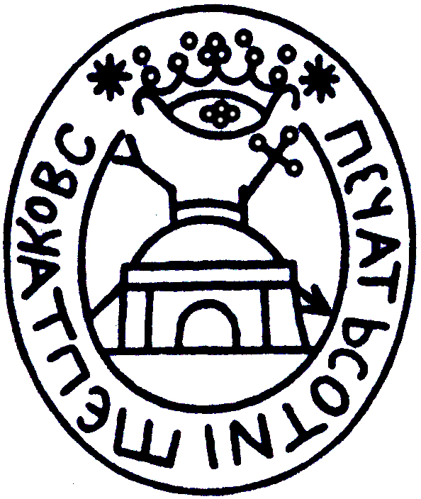 ЦДІАК, ф.64, оп.1, спр.1113, арк.1. 1775 р.